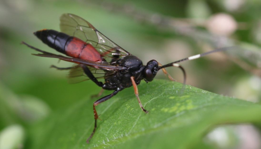 Stenichneumon culpator (Weibchen) am 24.8.2017 in der Schwetzinger Hardt